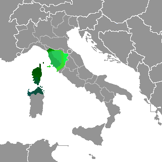 Variadades de la lengua toscana